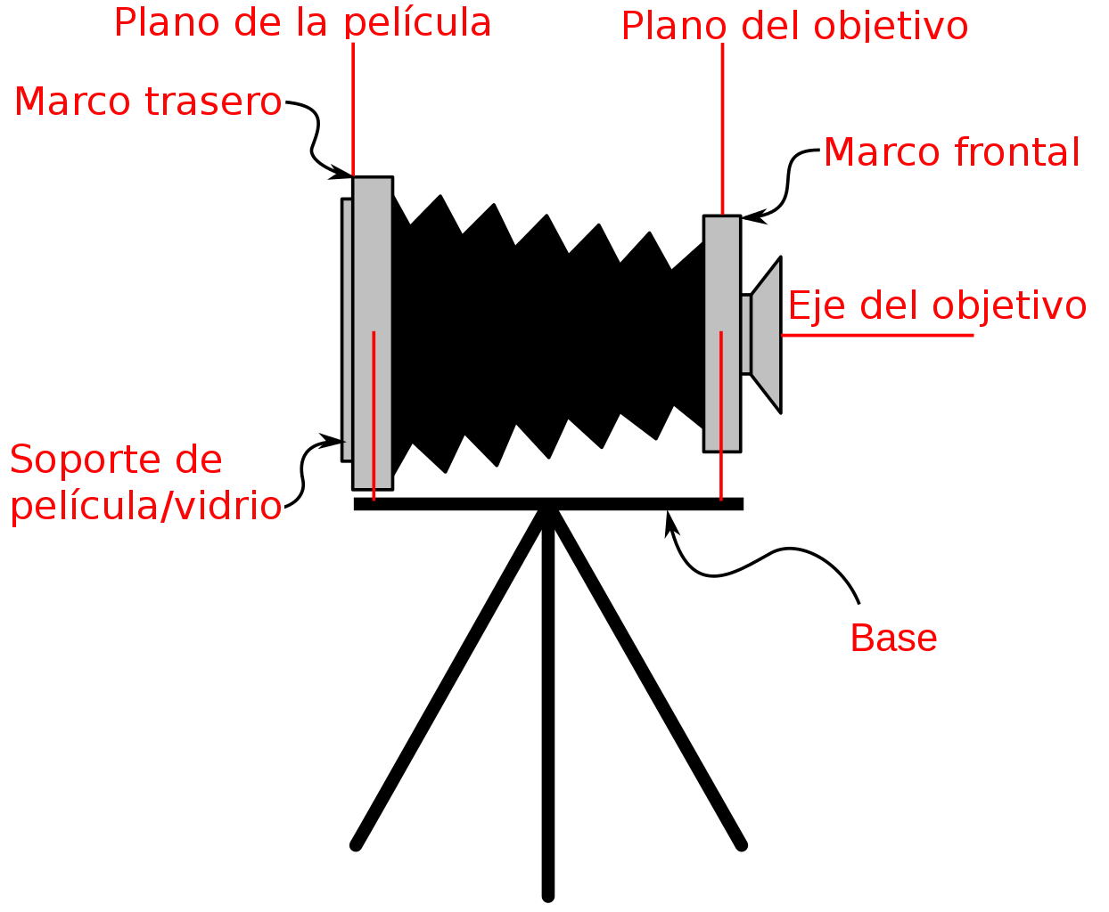 Terminología básica de una cámara de fuelle. Dibujo original por User:Cdheald